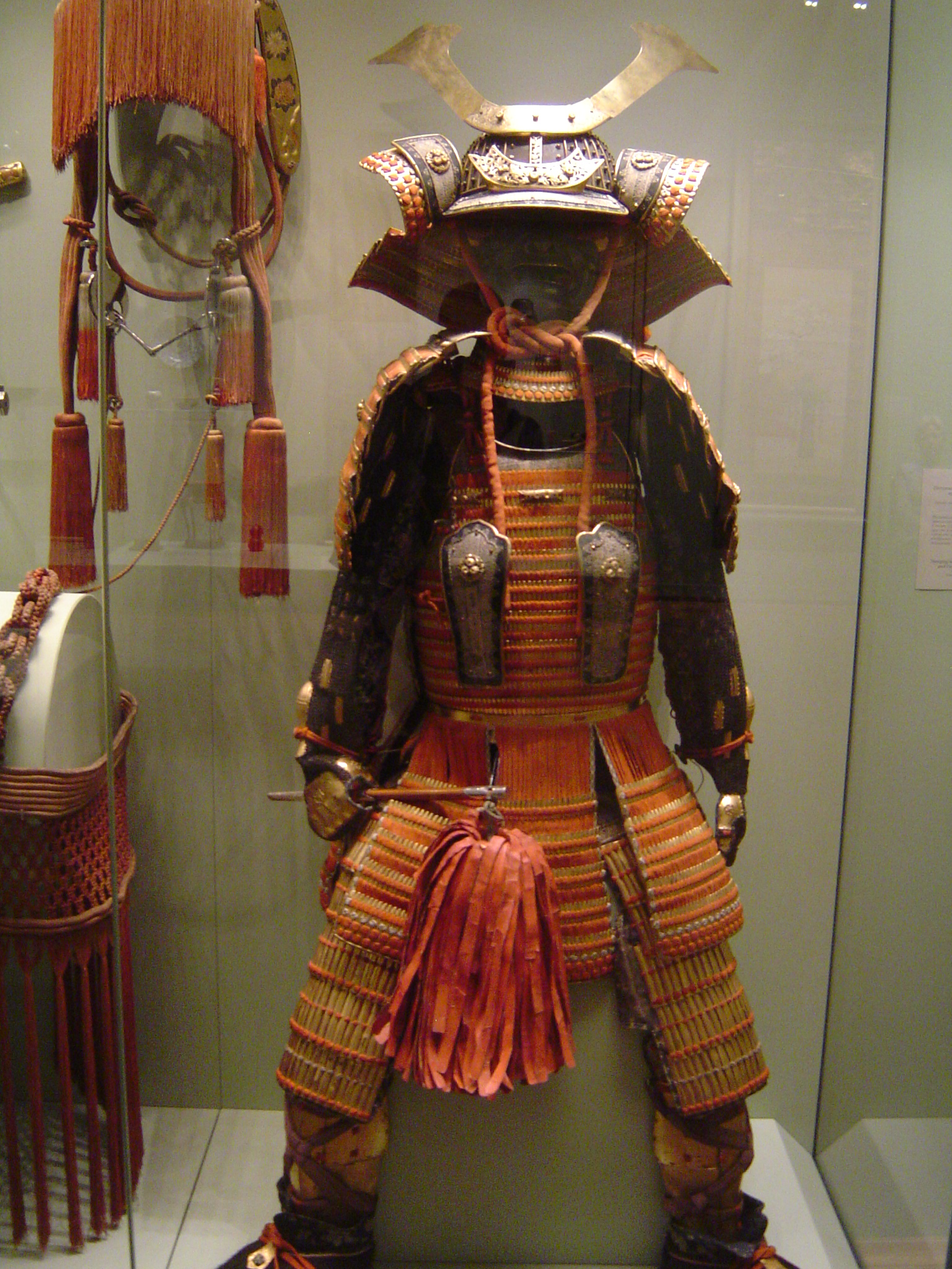 Эрмитаж. Экспозиция «Культура Японии»